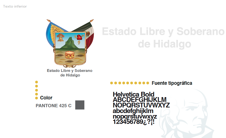 Esquema del texto inferior de Escudo del Estado de Hidalgo